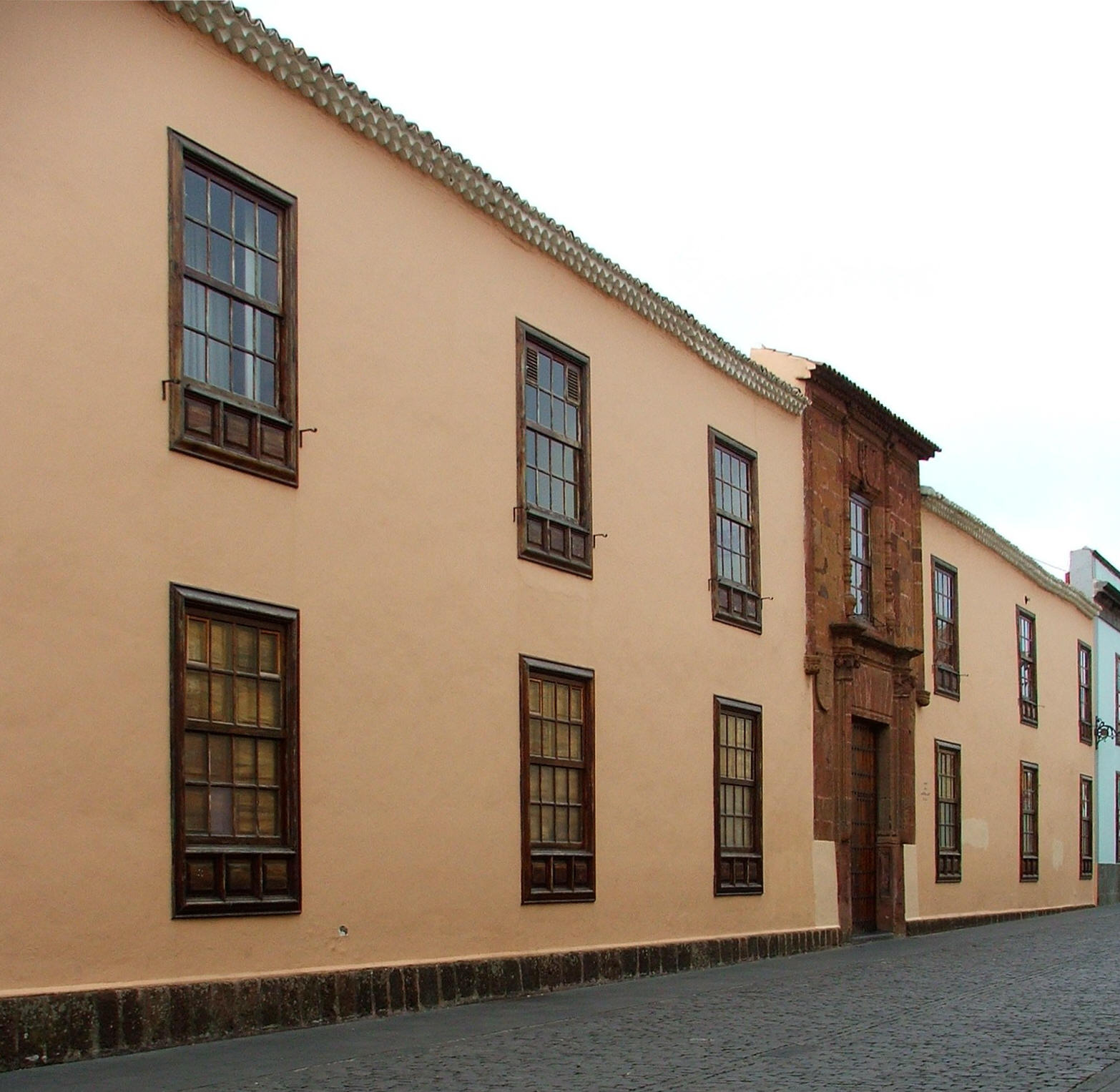 Casa del Corregidor La Laguna